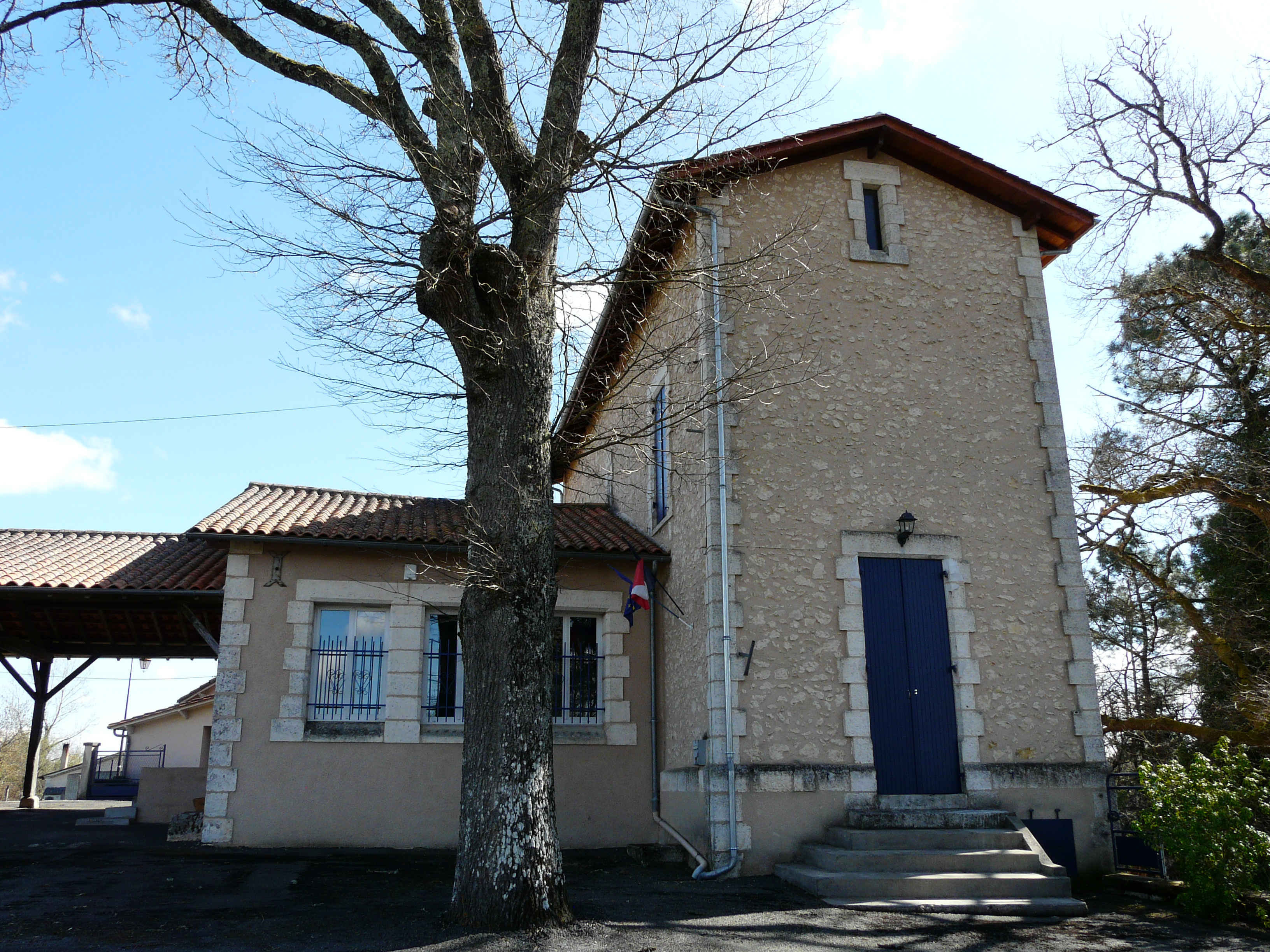 La mairie de Saint-Étienne-de-Puycorbier, Dordogne, France.